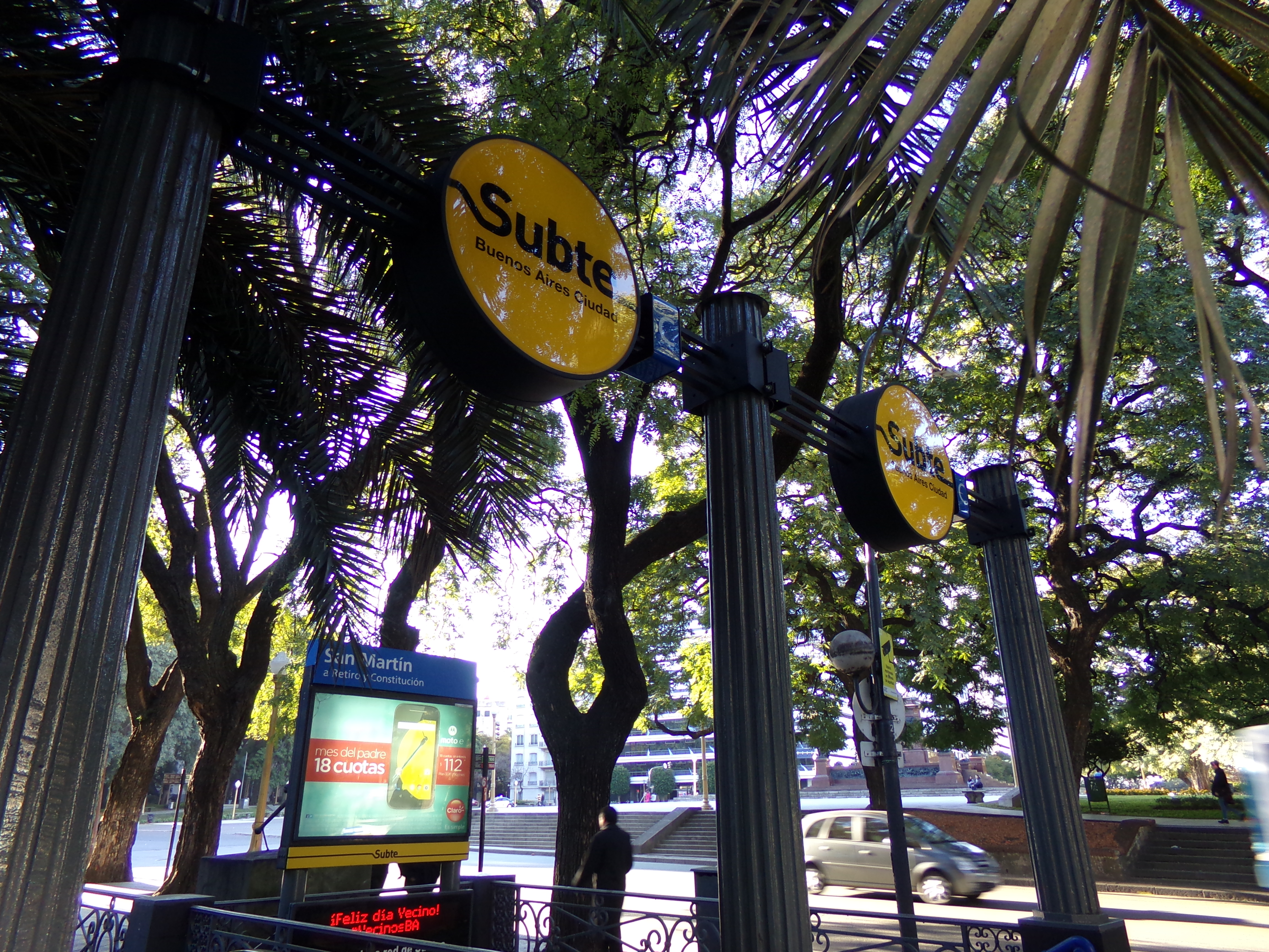 General San Martín, línea C.